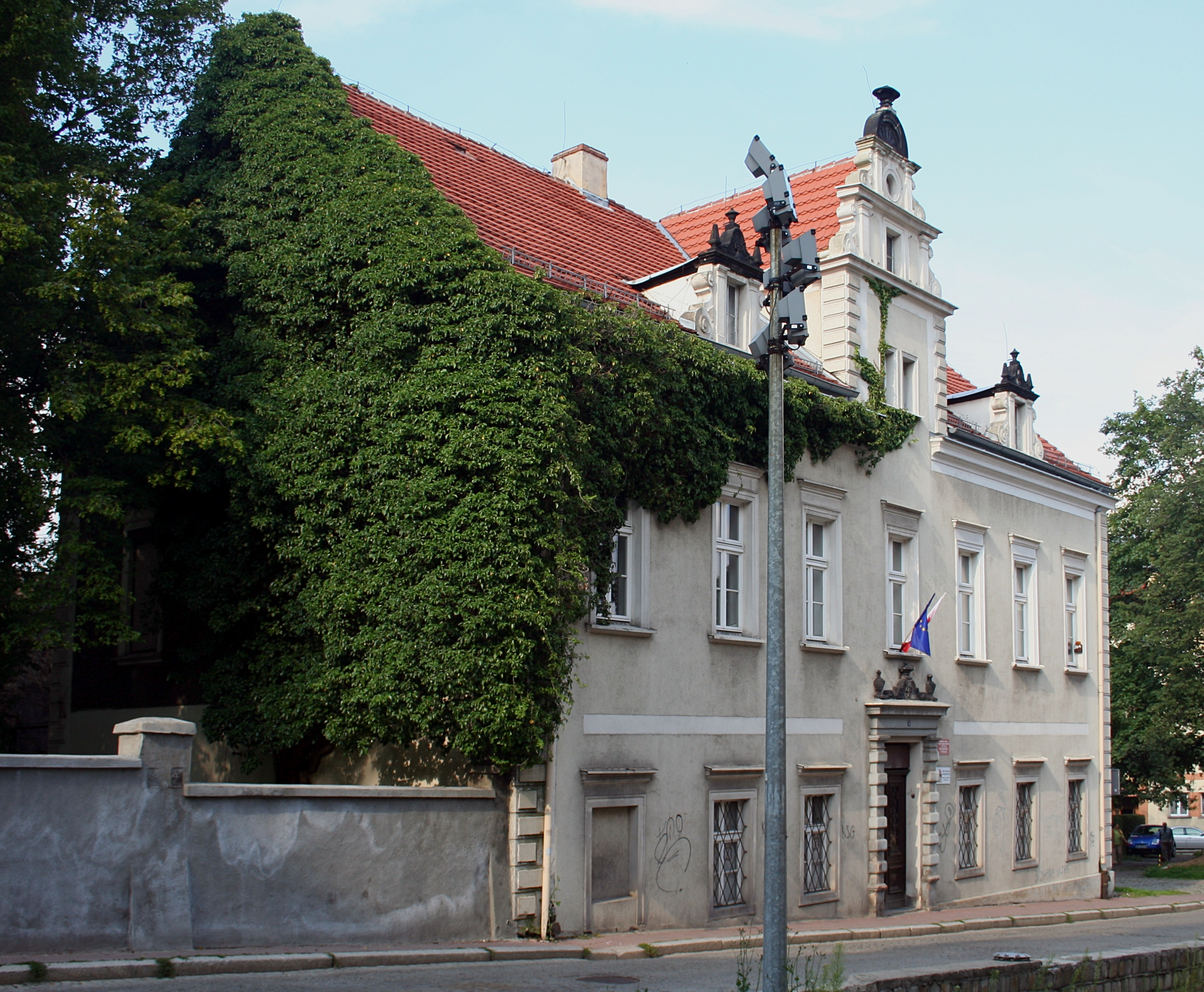 Dom Bretanii (oddział służby ochrony zabytków) w Wałbrzychu, ul. Zamkowa 3 02.1991.